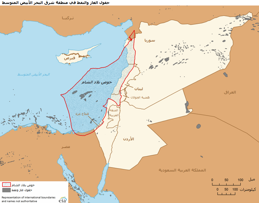 حقول الغاز والنفط المُكتشفة في حوض بلاد الشام، شرق البحر المتوسط